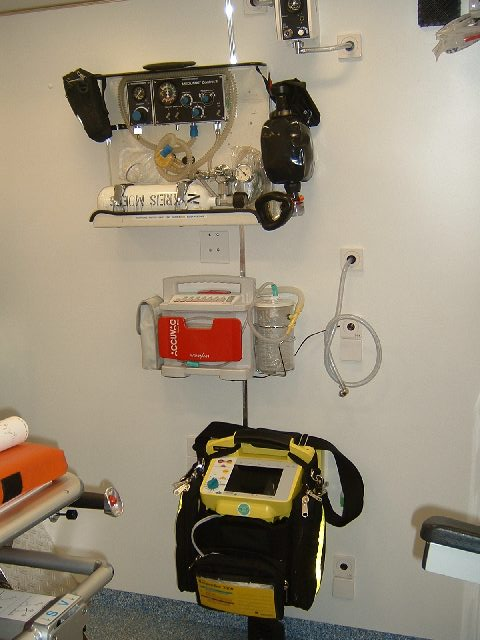 Innenraum eines Rettungswagens, zu sehen sind EKG/Defibrillator, Notfallbeatmungsgerät und Absaugpumpe